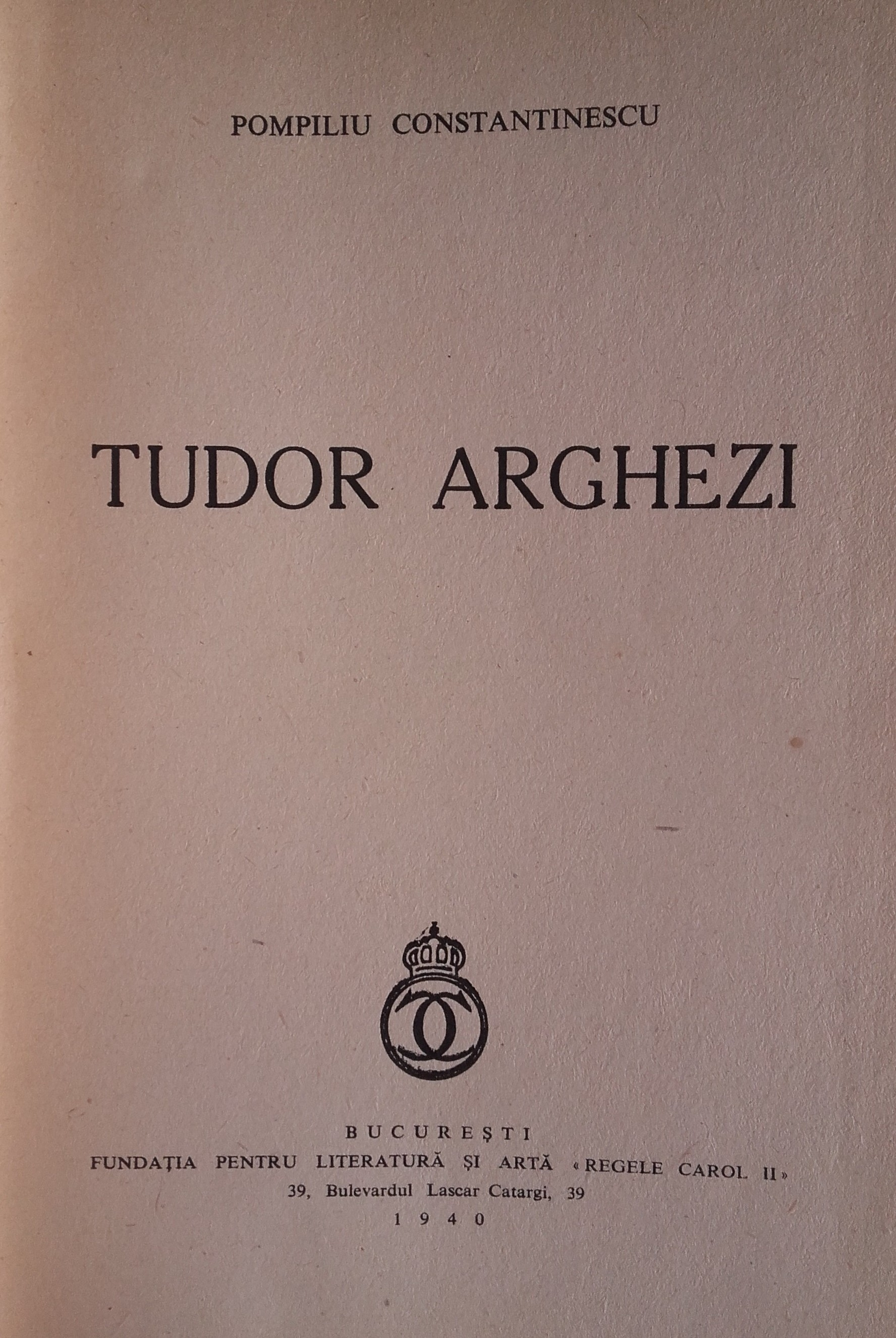 Scanare digitală - prima pagină a vol. „Tudor Arghezi” de P. Constantinescu (1940)